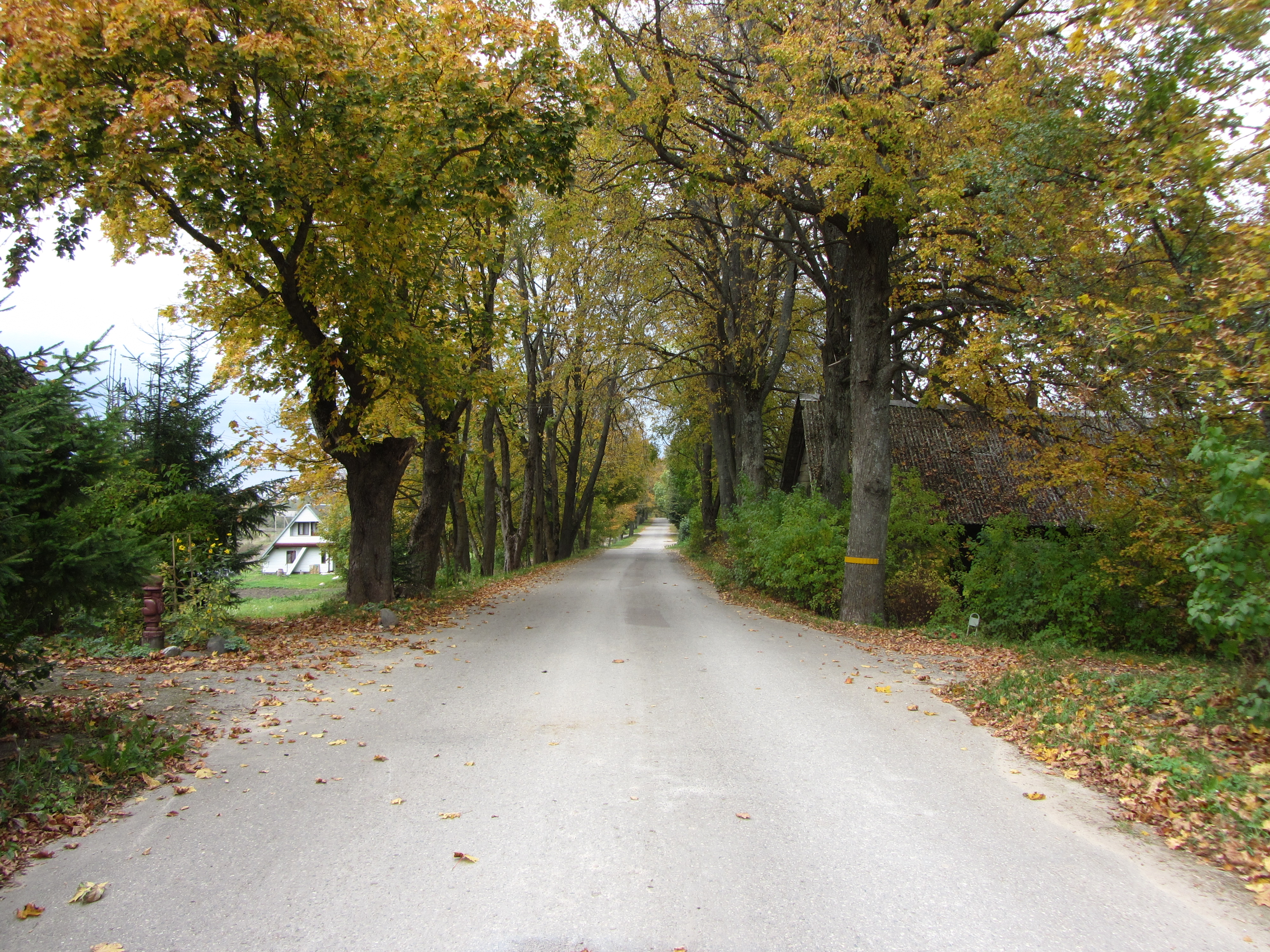 Bikūnai 28402, Lithuania